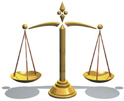 Balance